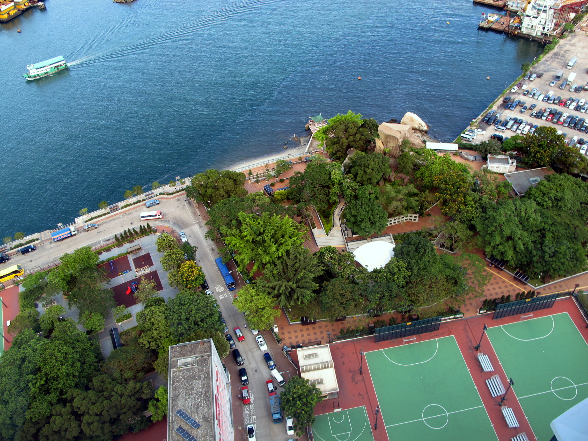 To Kwa Wan Hoi Sham Park